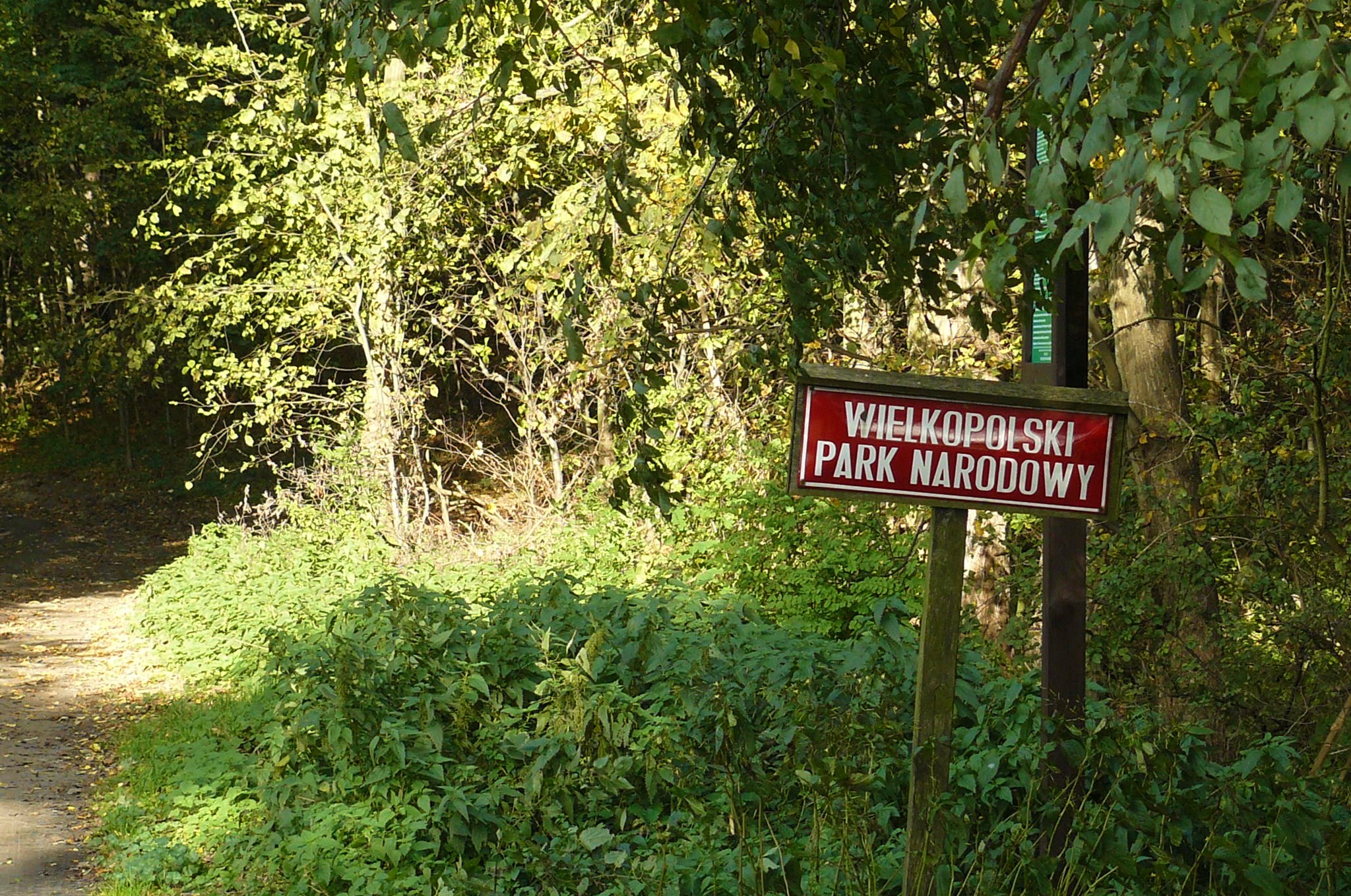 Wielkawieś.